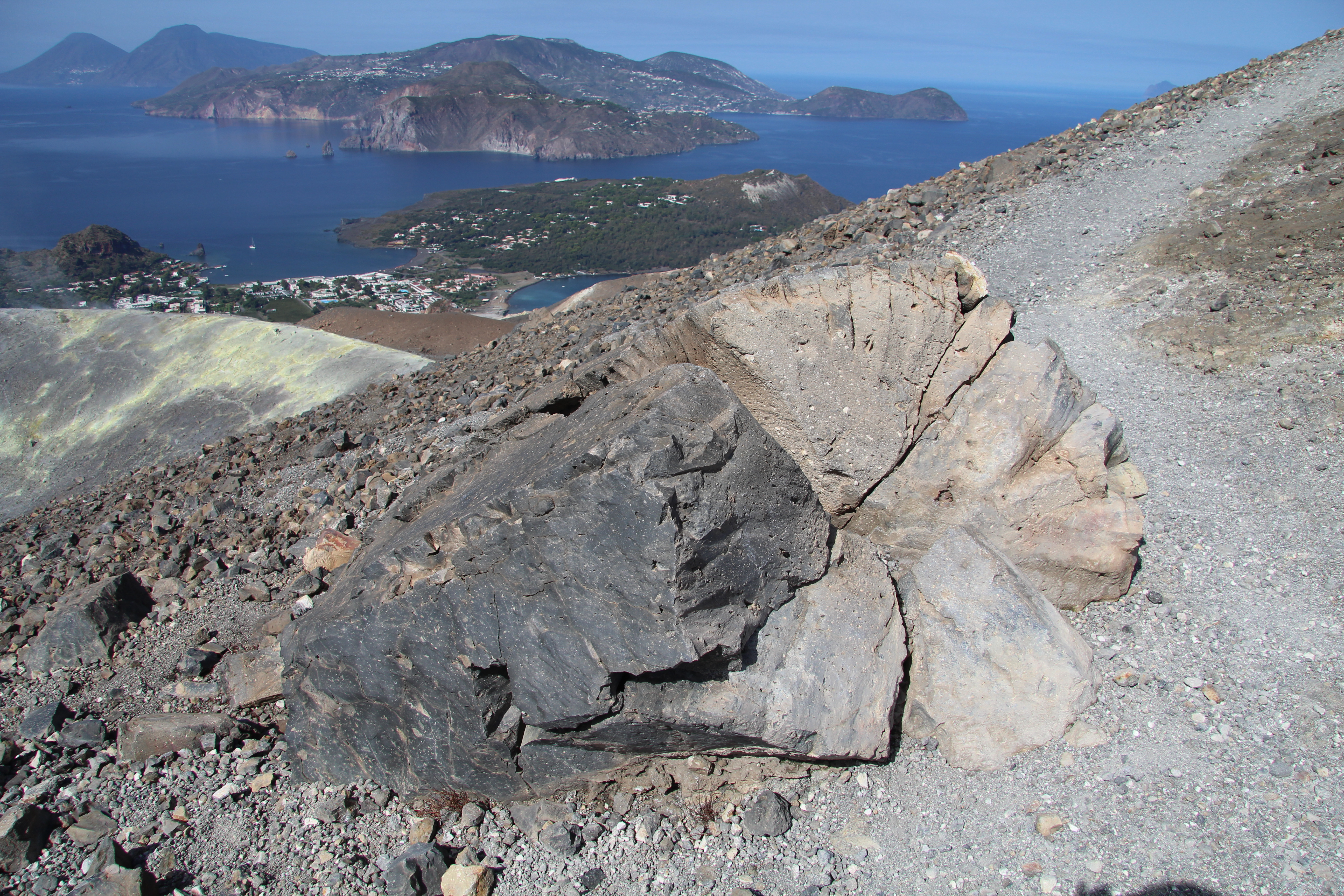 Vulkanischer Block am Kraterrand des Cran Cratere, Vulcano